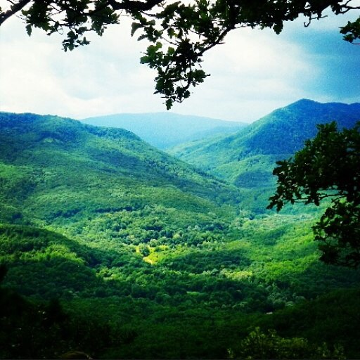 Гора Собер-Баш, Северский район This image is related to the protected area of Russia number 2310291